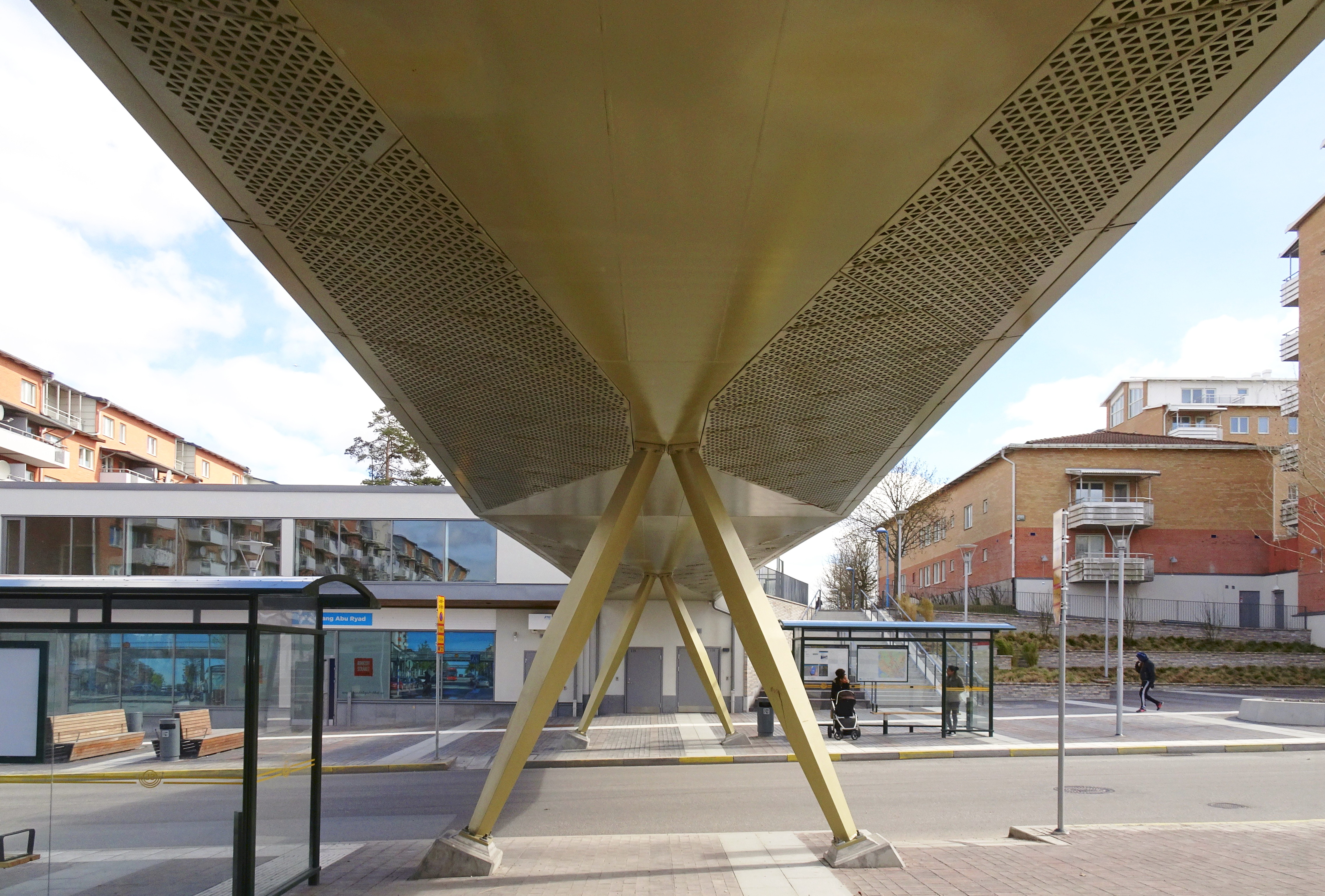 Rinkebystråkets bro, arkitekt &Rundquist